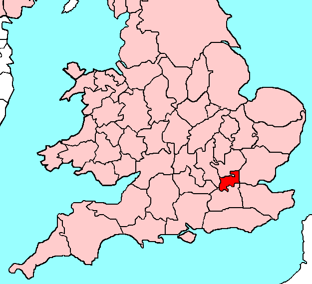 Middlesex